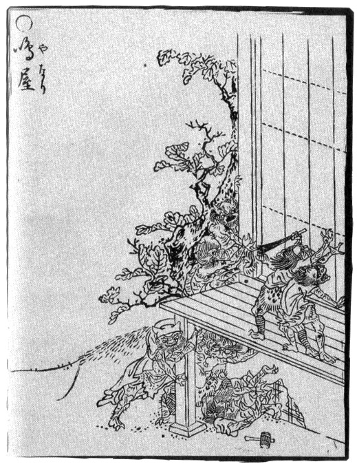 Yanari (鳴屋) from the Gazu Hyakki Yakō